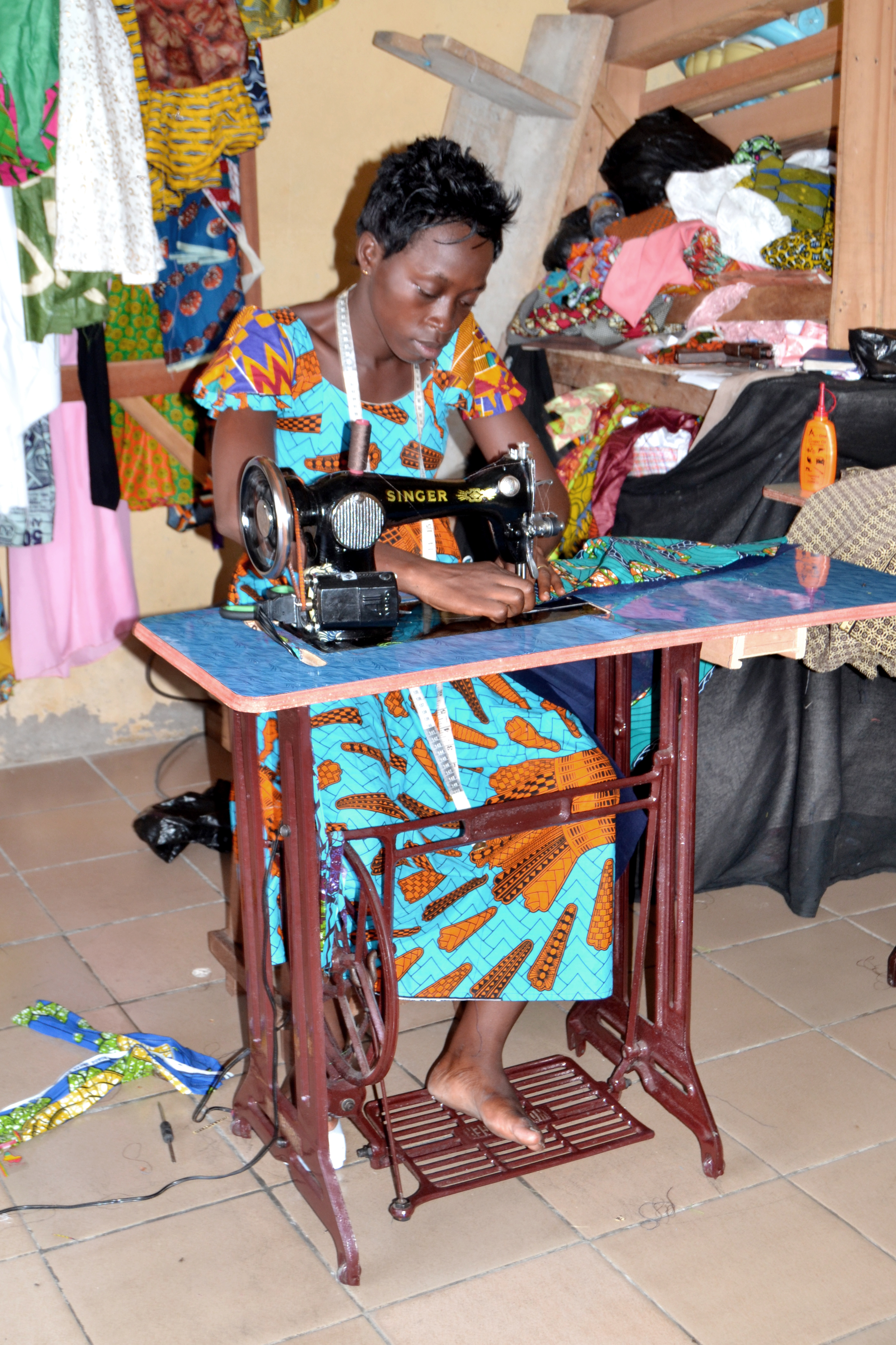 une couturière à Abidjan This is an image of "African people at work" from Ivory Coast